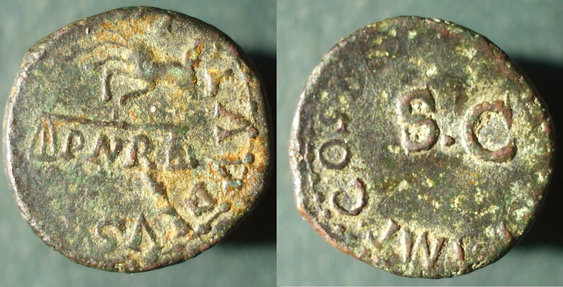 quadrans de claude balance PNR SC Rome